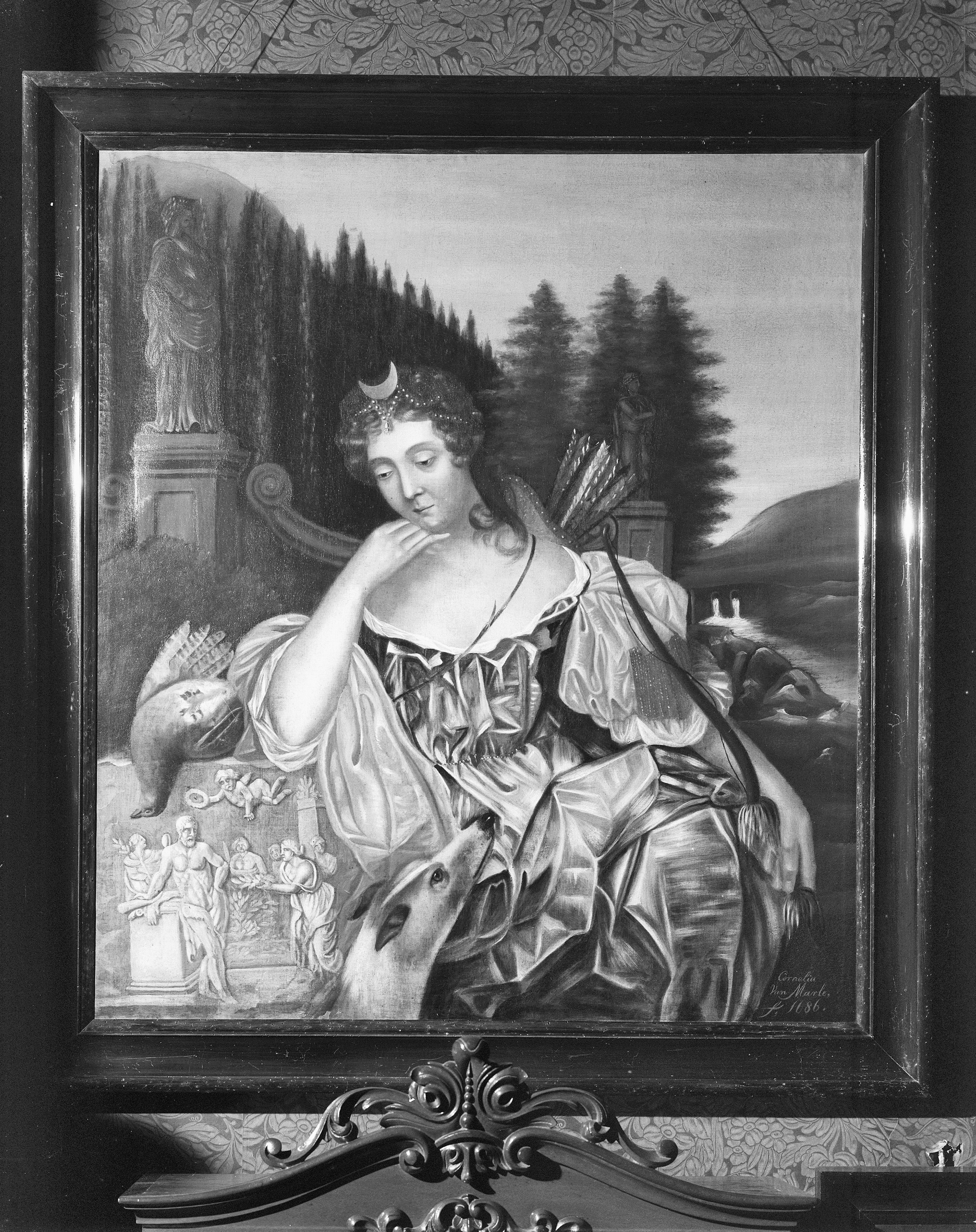 Vrouwenhuis: schilderij Jonge vrouw als Diana in een landschap This tag does not indicate the copyright status of the attached work. A normal copyright tag is still required. See Commons:Licensing.